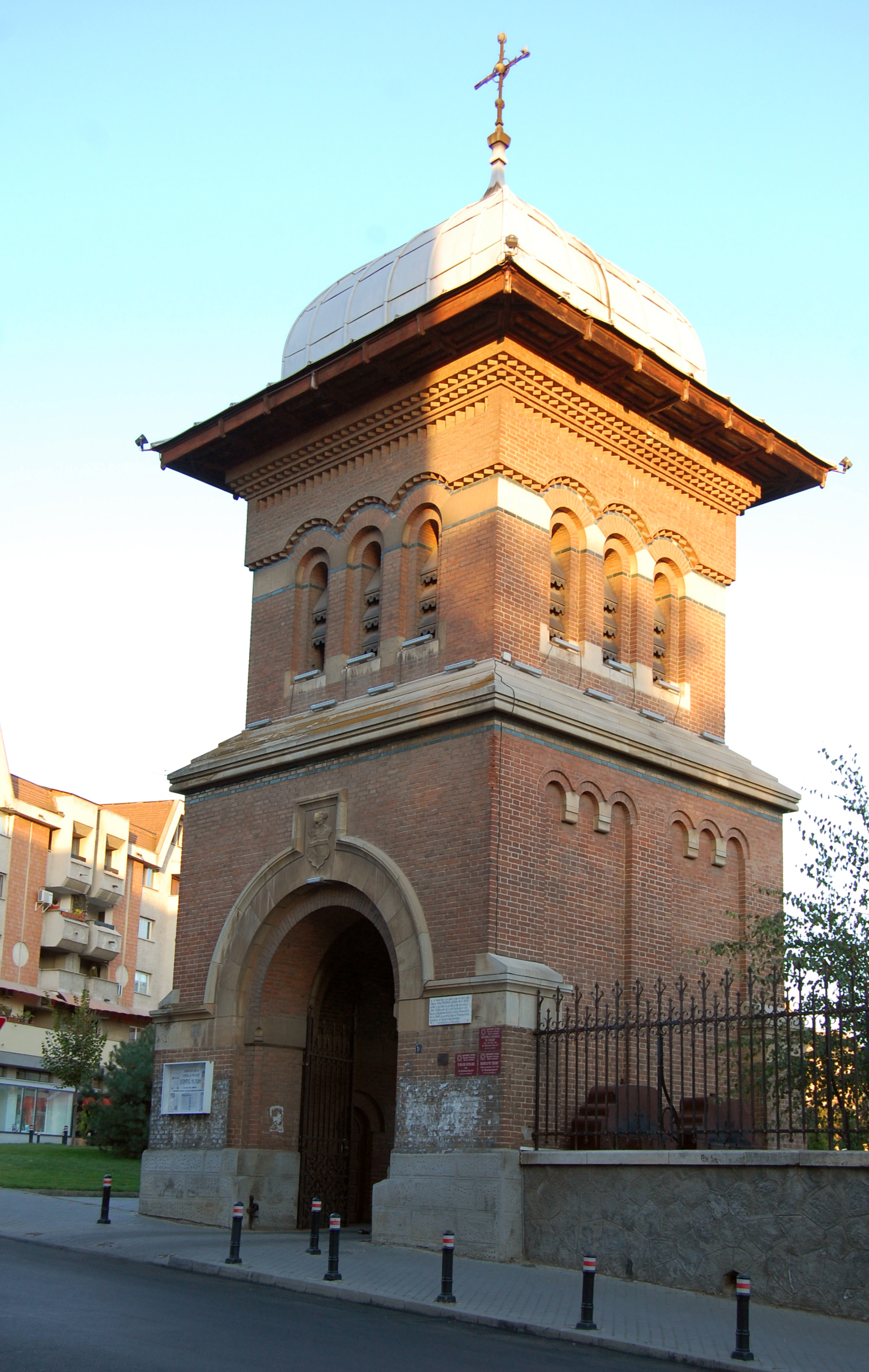 Turn de Intrare, Biserica "Sf. Treime" 02